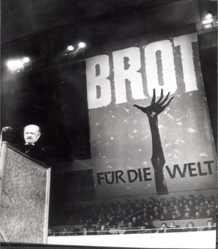 Eröffnung der ersten Aktion "Brot für die Welt" in Berlin